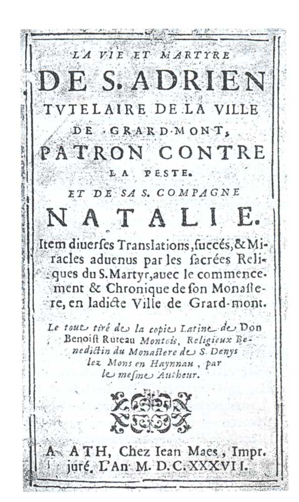 Photocopie scannée d'une page d'un livre imprimé en 1637 chez Jean Maes d'Ath. Archives de la ville d'Ath